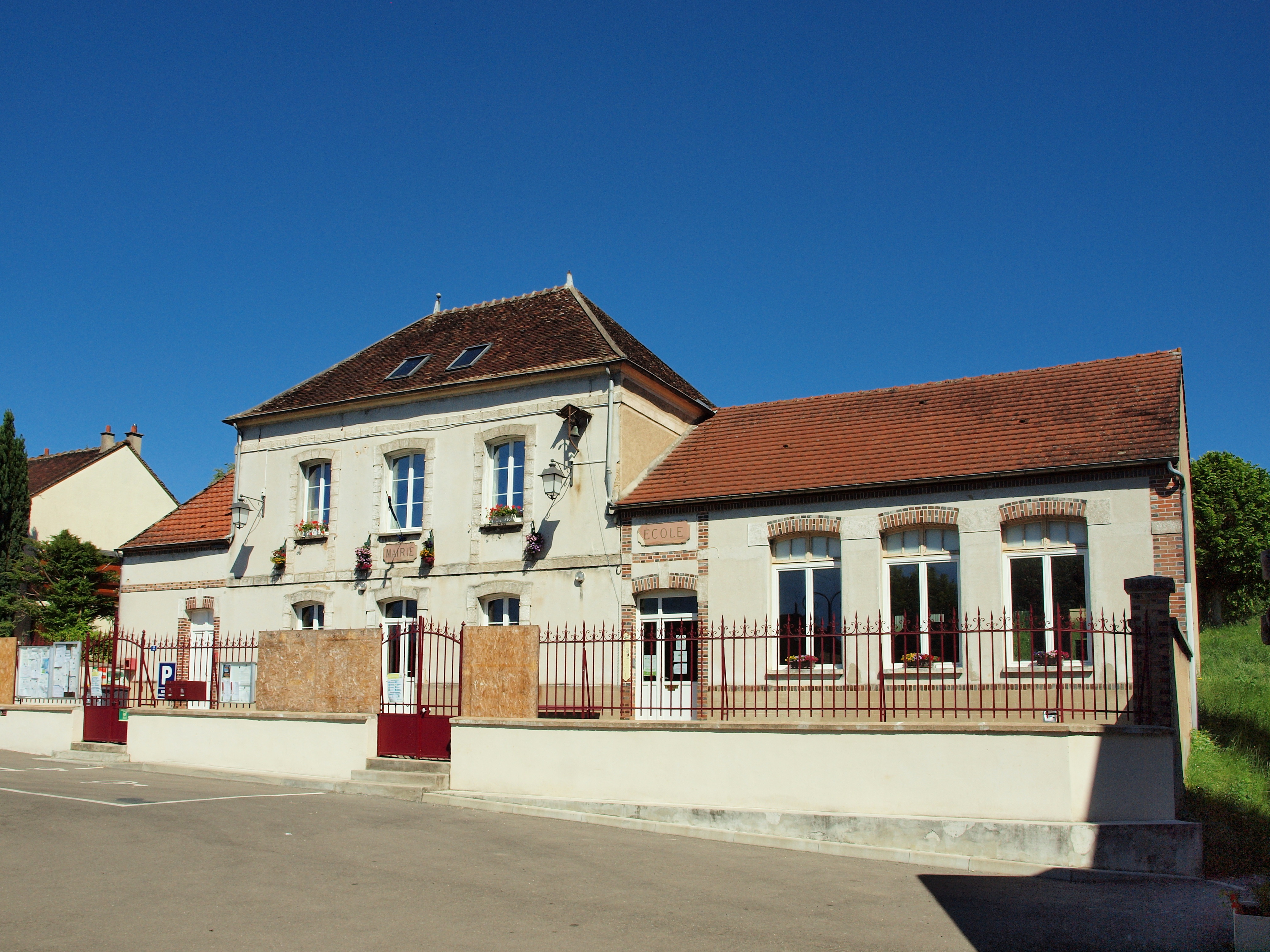 Collemiers (Yonne, France)